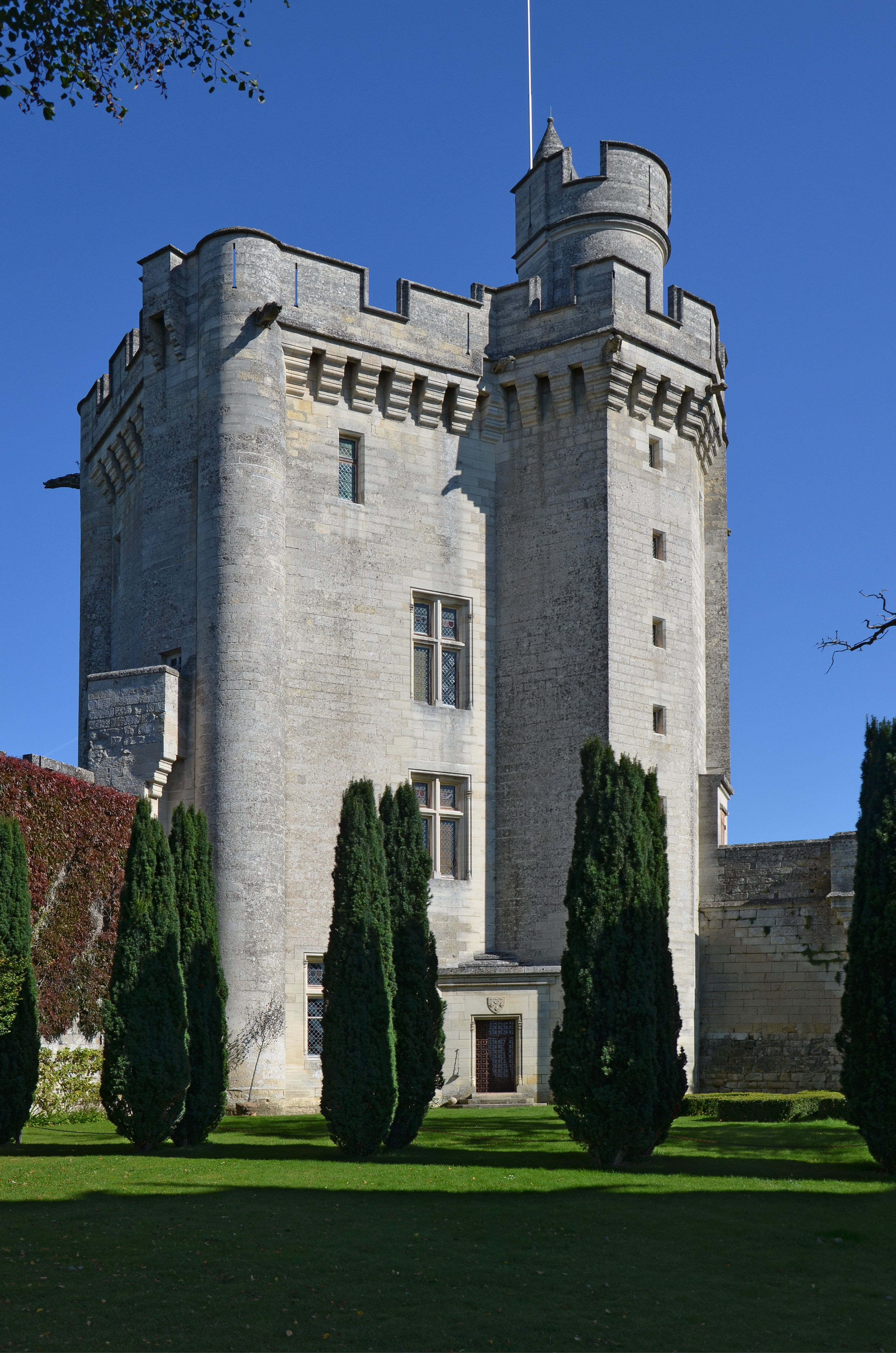 Donjon de Vez, Oise, Picardie, France